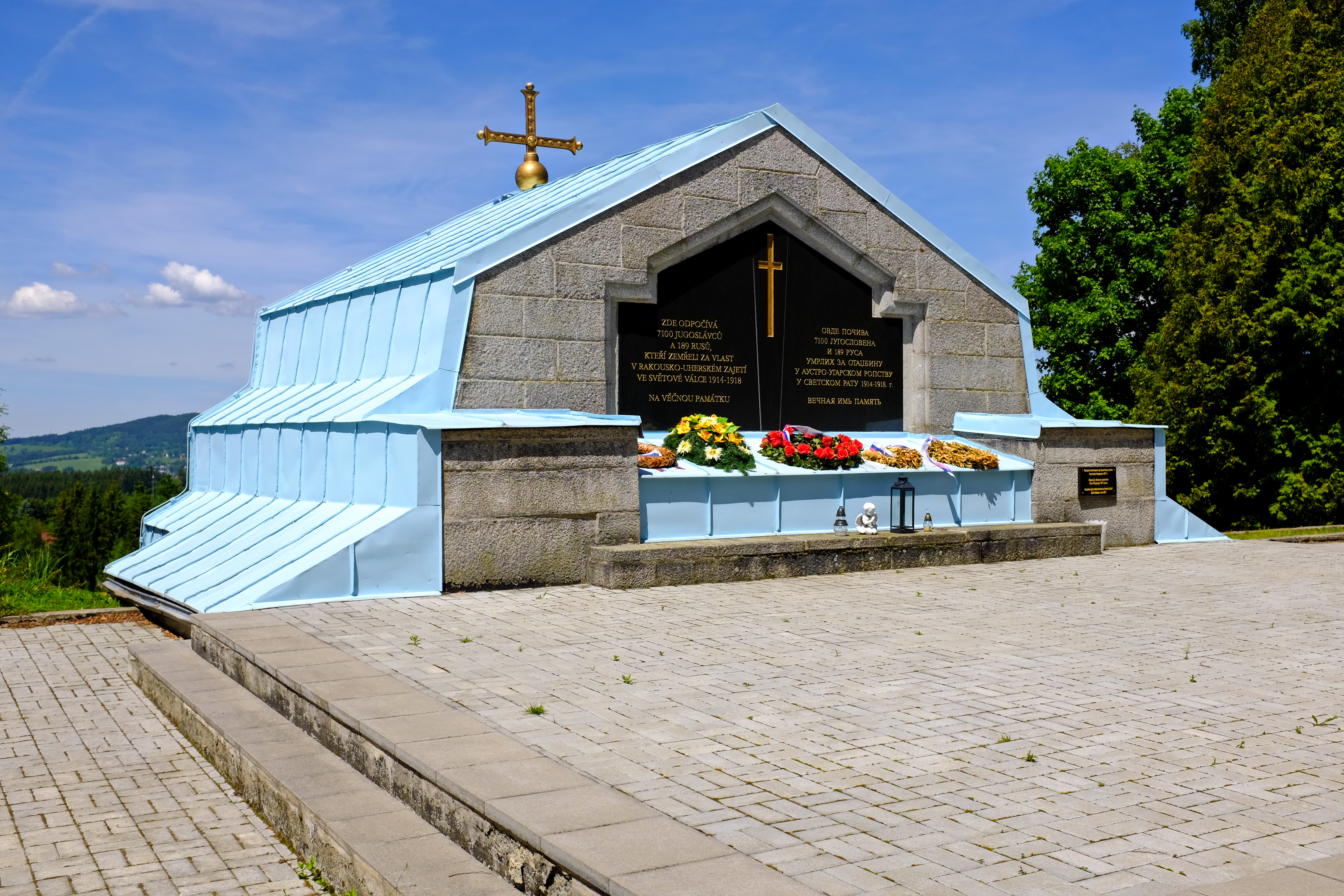 Mauzoleum, západně nad vsí, Jindřichovice (okres Sokolov).